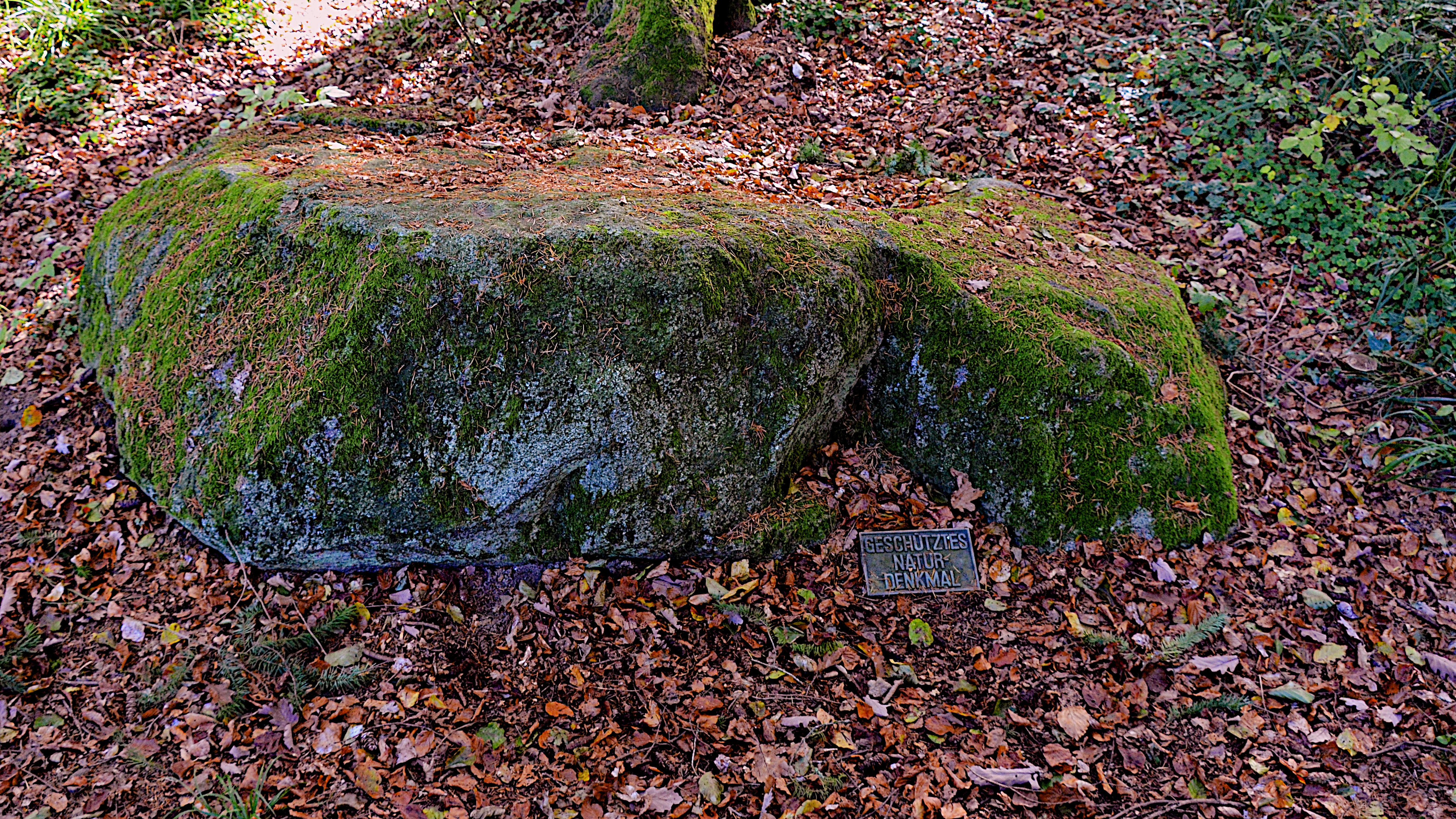 Der Schalenstein Steditberg ist ein erratischer Block bzw. Findling bei Büren an der Aare im Kanton Bern, Schweiz